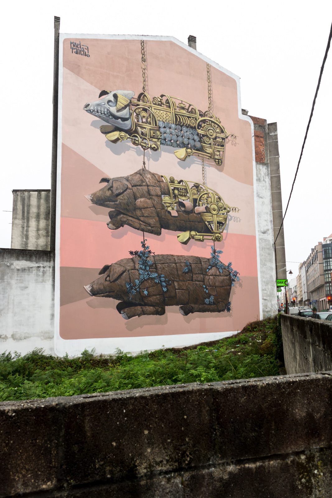 Rexenera - 36